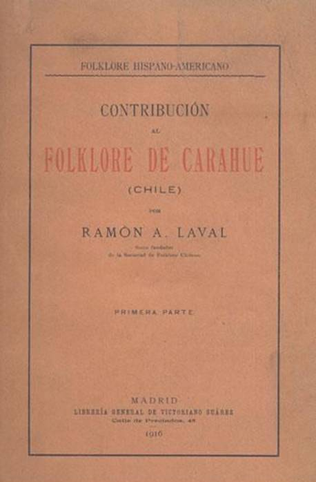 Libro escrito por Ramón Laval Alvial: Contribución al folklore de Carahue (Año 1916 – Chile)